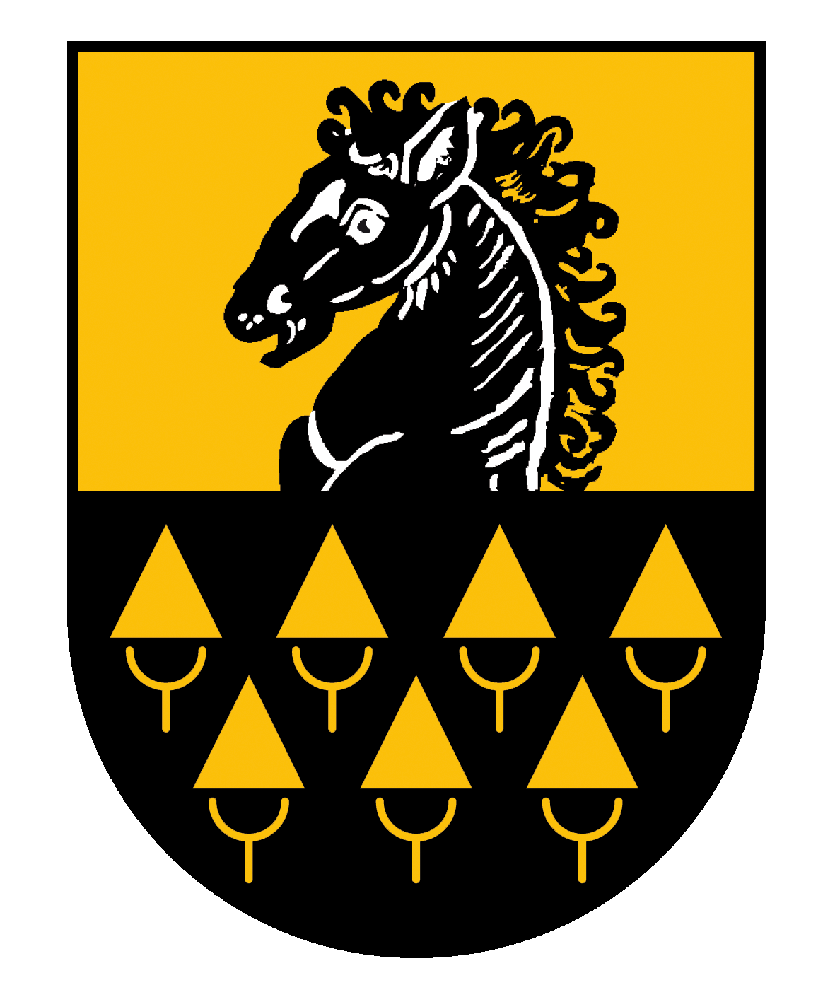 Niedernsill Gemeindewappen